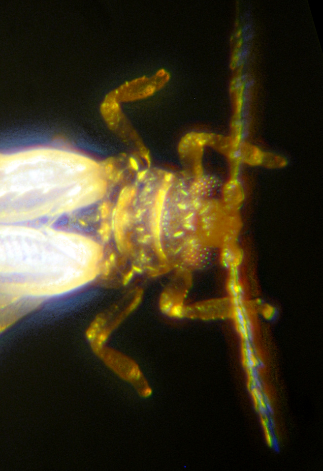 Thysanoptera-Kopf, Oberseite